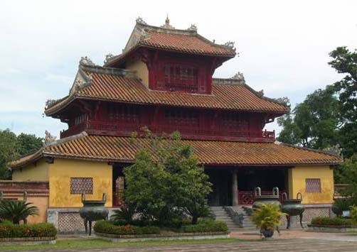 Hiển Lâm Các trong hoàng thành Kinh thành Huế - Việt Nam